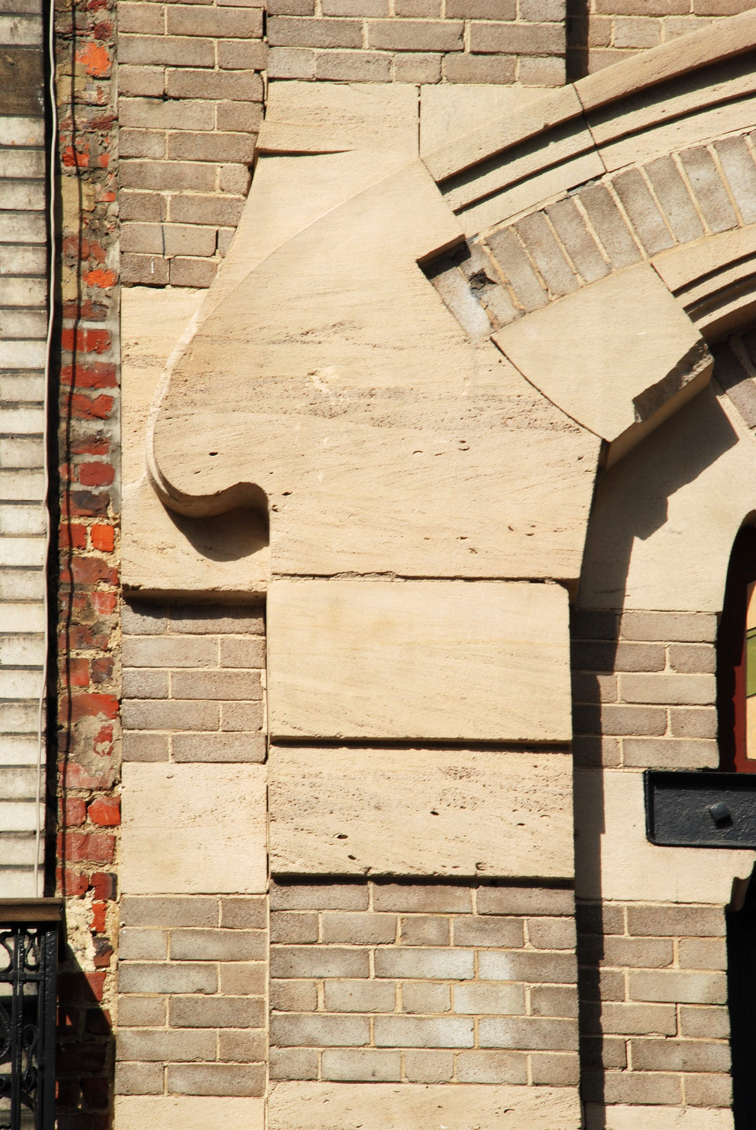 Belgique - Bruxelles - Atelier de sculpture de Jacques Sermon et Henri Pletinckx